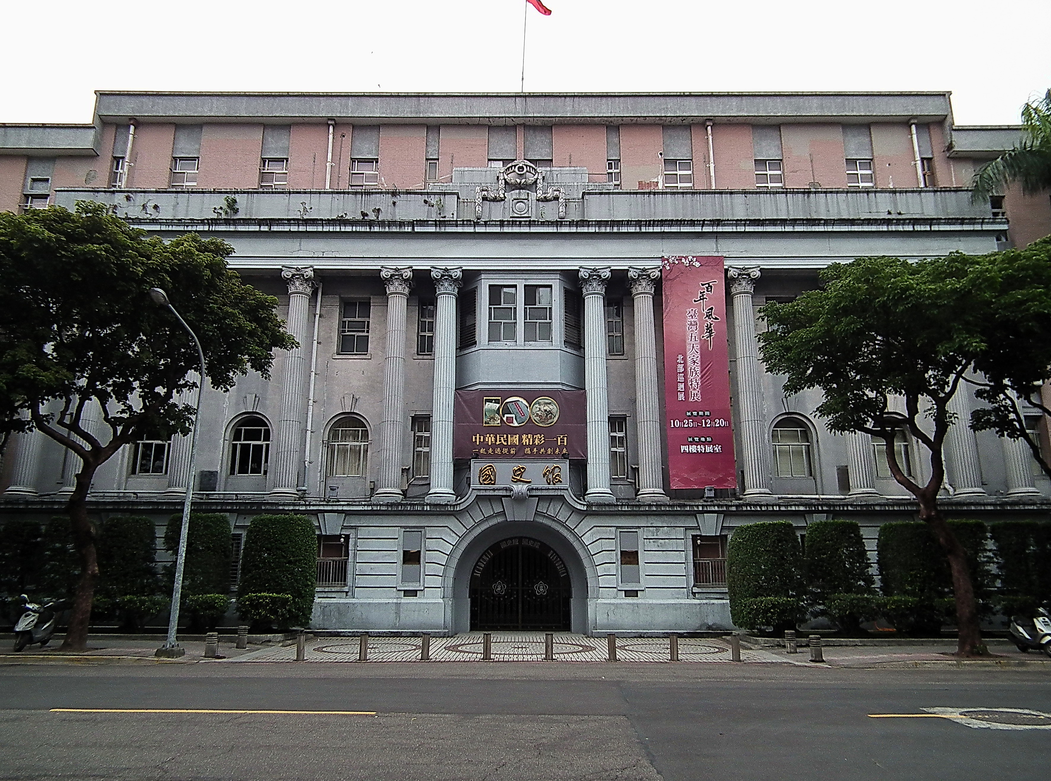 中華民國國史館慶祝中華民國建國一百週年。